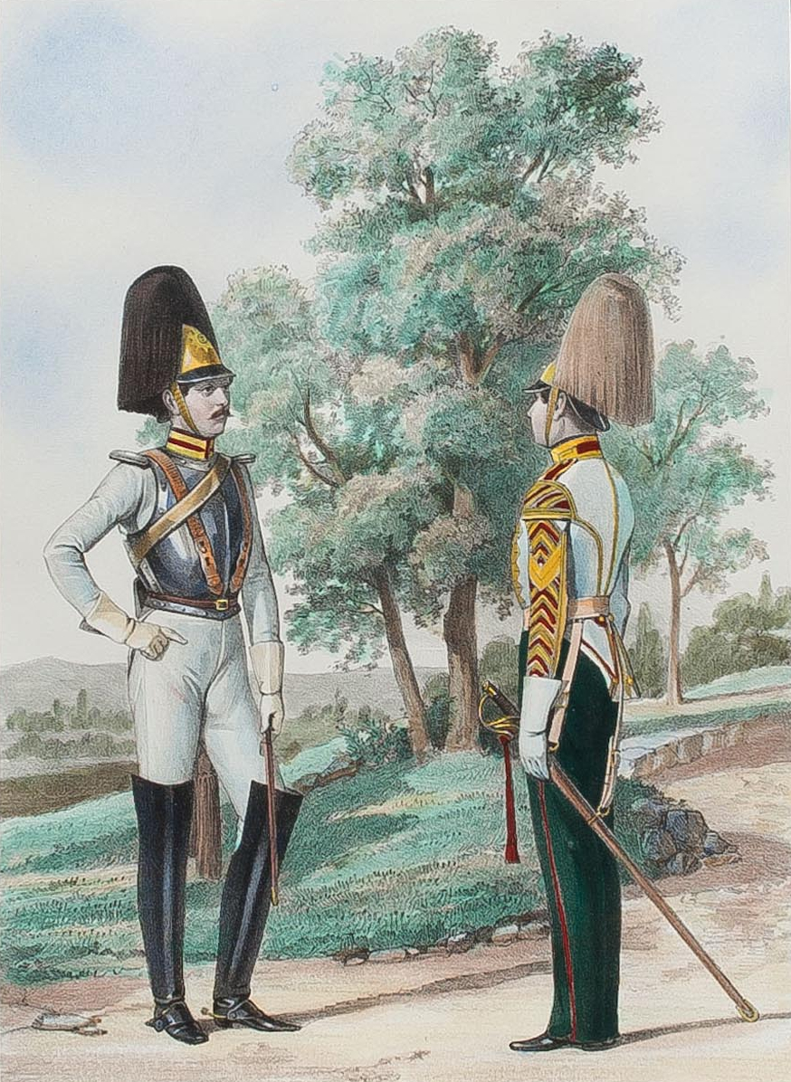 Обер-офицер и Трубач Кавалергардского Её Величества и Л. Гв. Конного полков. 1845.